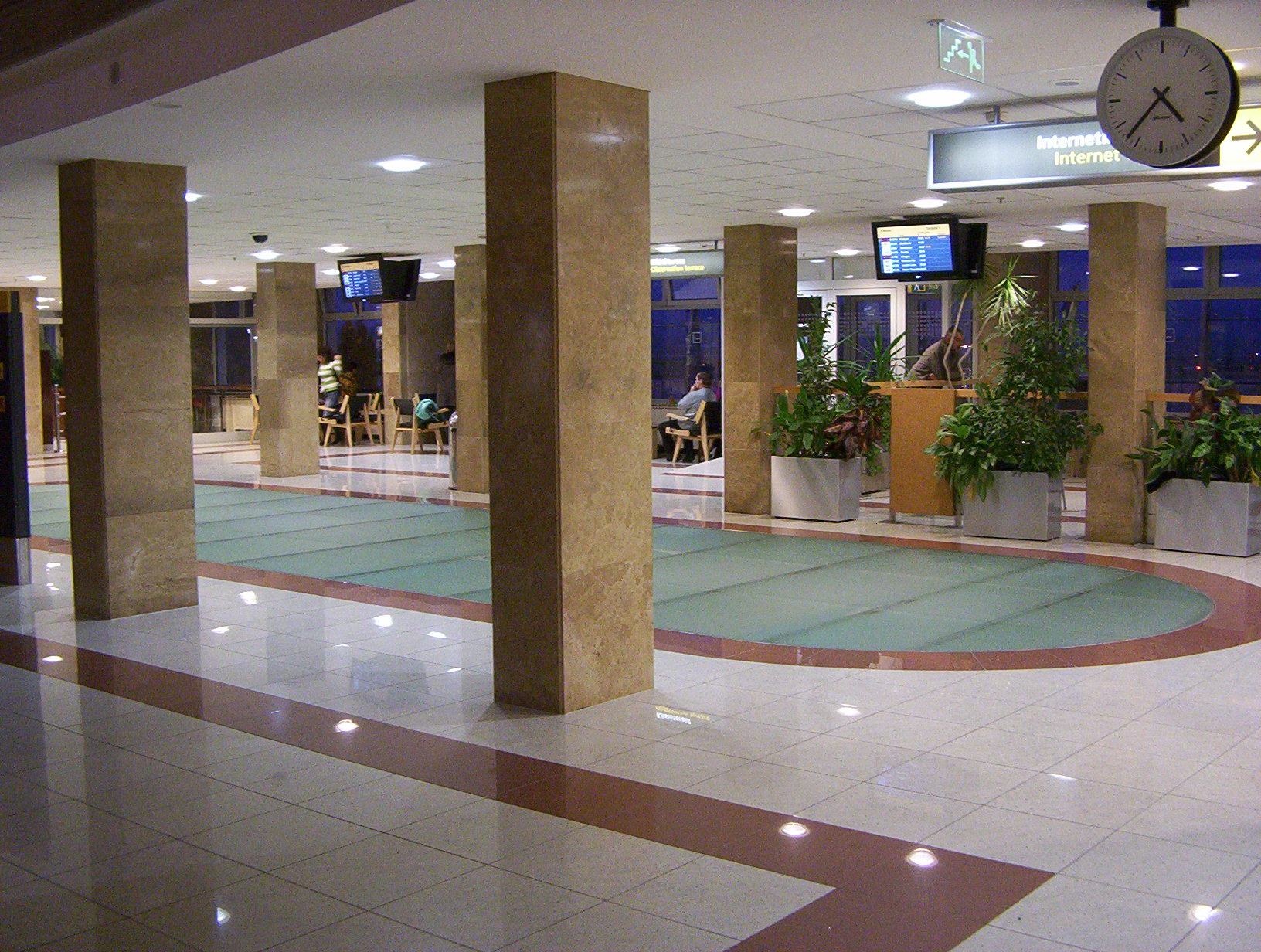 Liszt Ferenc Repülőtér 1-es terminál galériáján a kifutópályákhoz közeli rész